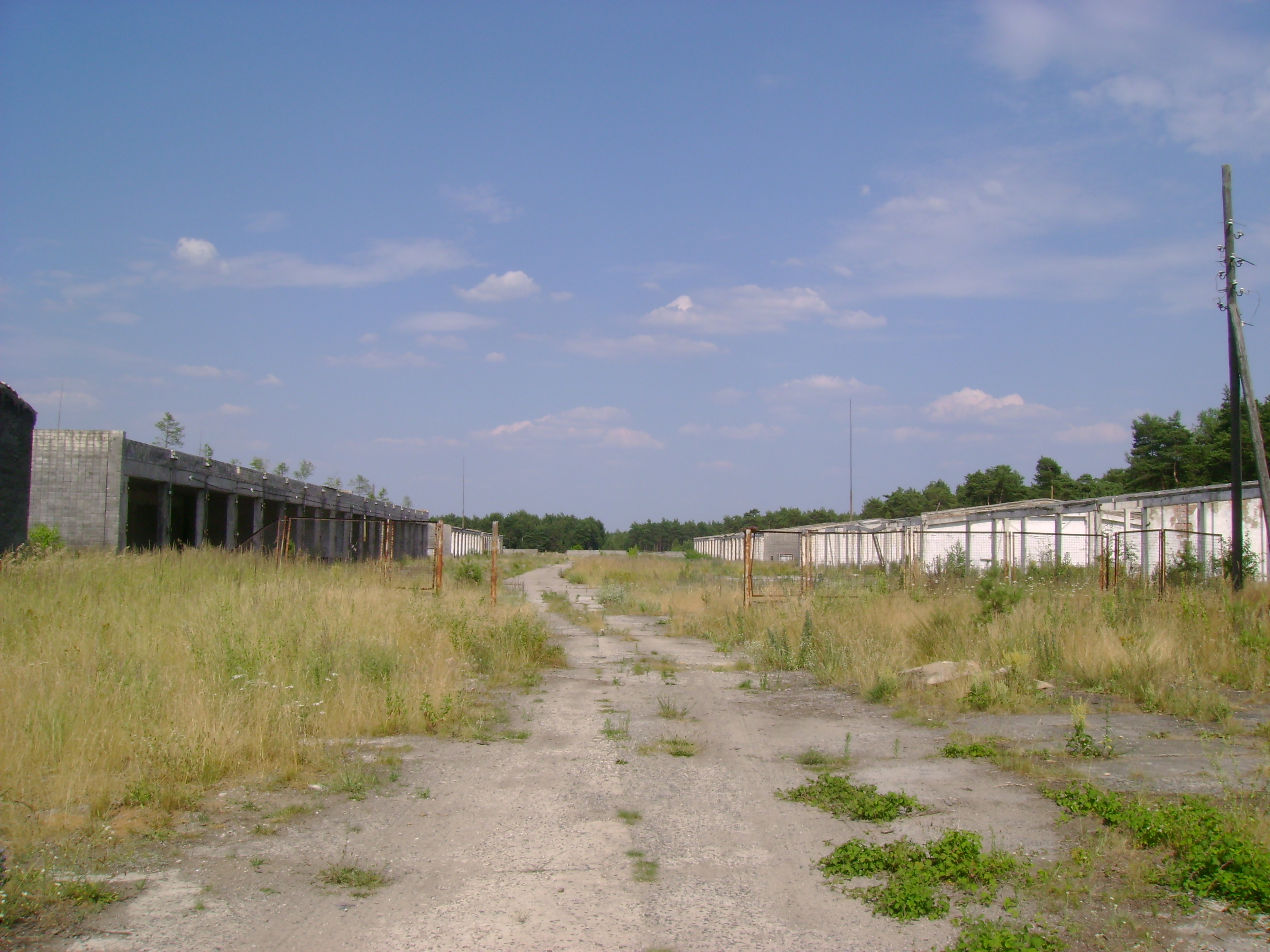 Garagen auf dem ehemaligen Militärareal Forst Zinna